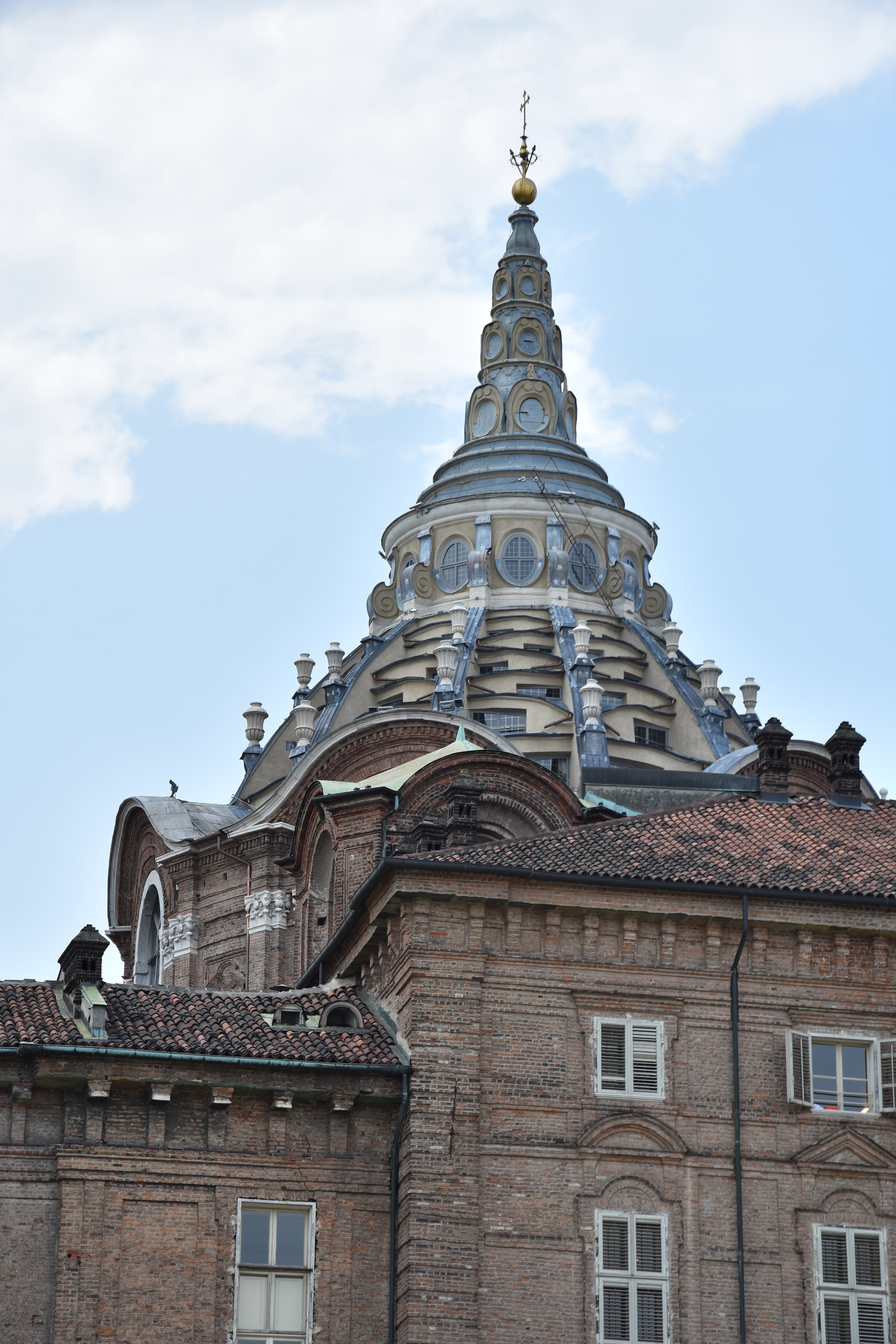 Il Palazzo Reale di Torino visto dalla parte superiore dei Giardini Reali.